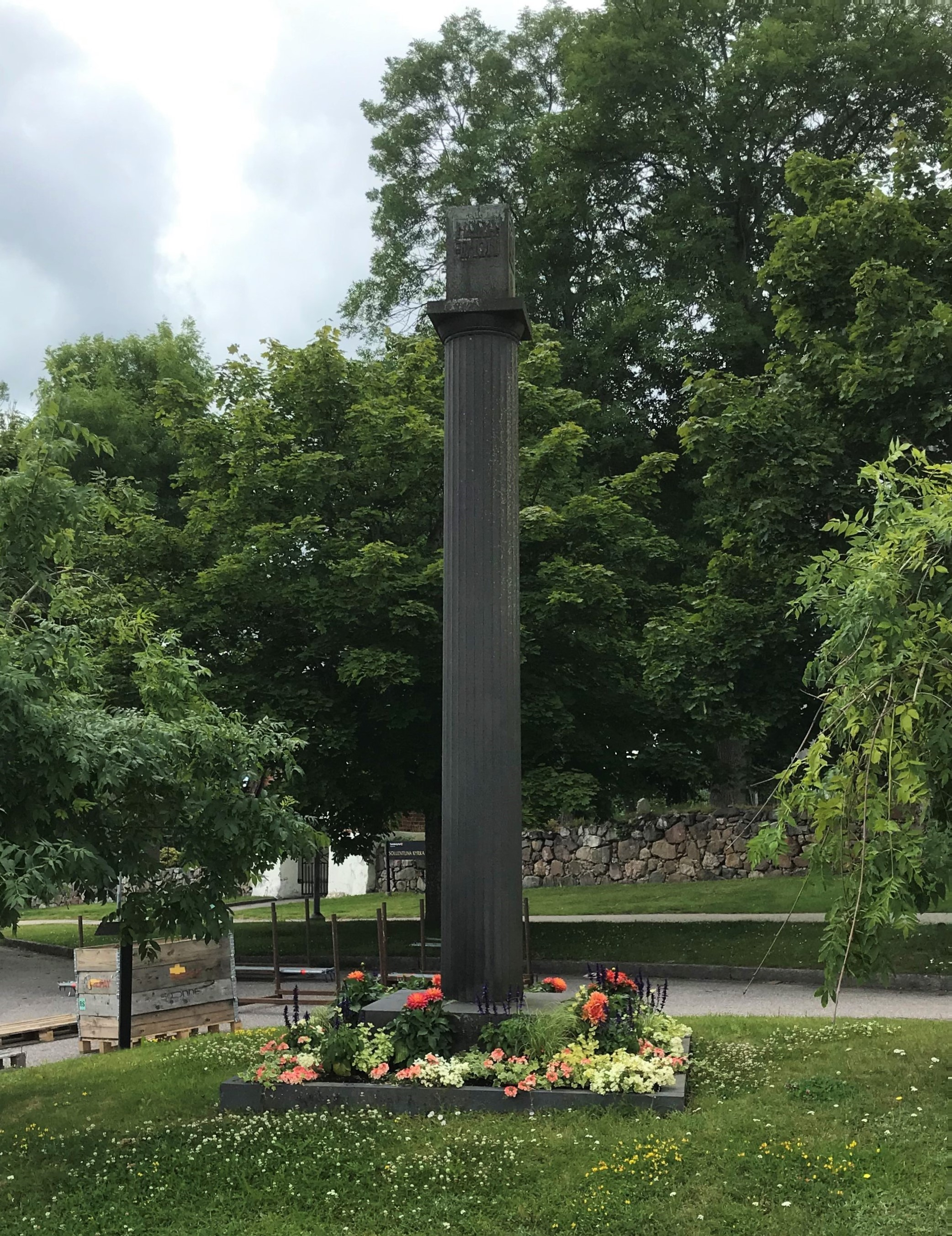 Varvningsmonumentet för marathon i olympiska spelen 1912 i Norrviken, Sollentuna.